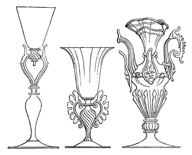 Venezianische Flügelgläser.